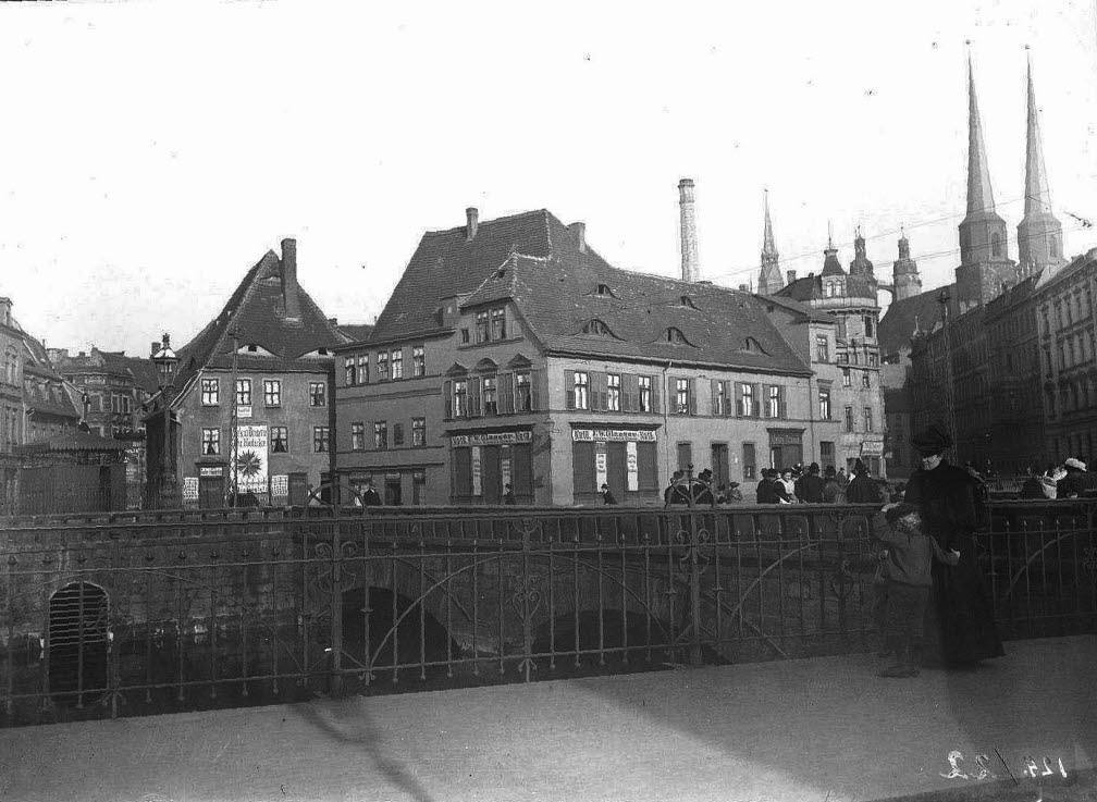 Blick vom Robert-Franz-Ring zur Klausbrücke und zum Haus Große Klausstraße 18, heute Nr. 12: Wilhelm-Friedemann-Bach-Haus